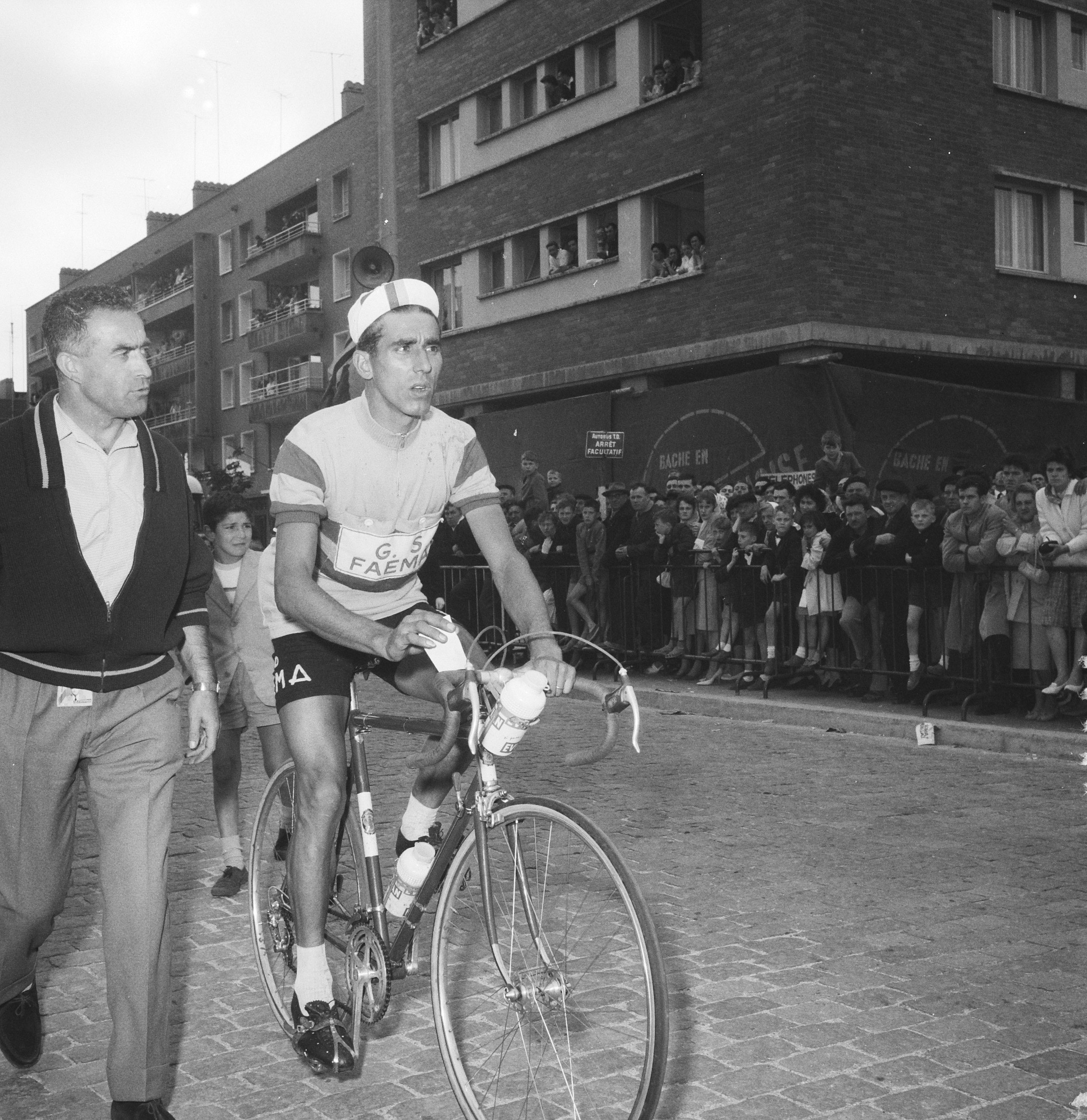 Collectie / Archief : Fotocollectie Anefo Reportage / Serie : [ onbekend ] Beschrijving : Tour de France , Bahamontes (op fiets) Datum : 27 juni 1960 Trefwoorden : fietsen Persoonsnaam : Bahamontes Instellingsnaam : Tour de France Fotograaf : Pot, Harry / Anefo Auteursrechthebbende : Nationaal Archief Materiaalsoort : Negatief (zwart/wit) Nummer archiefinventaris : bekijk toegang 2.24.01.03 Bestanddeelnummer : 911-3735